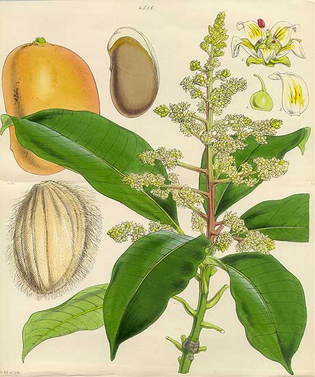 Mango Tree - Mangifera indica, India